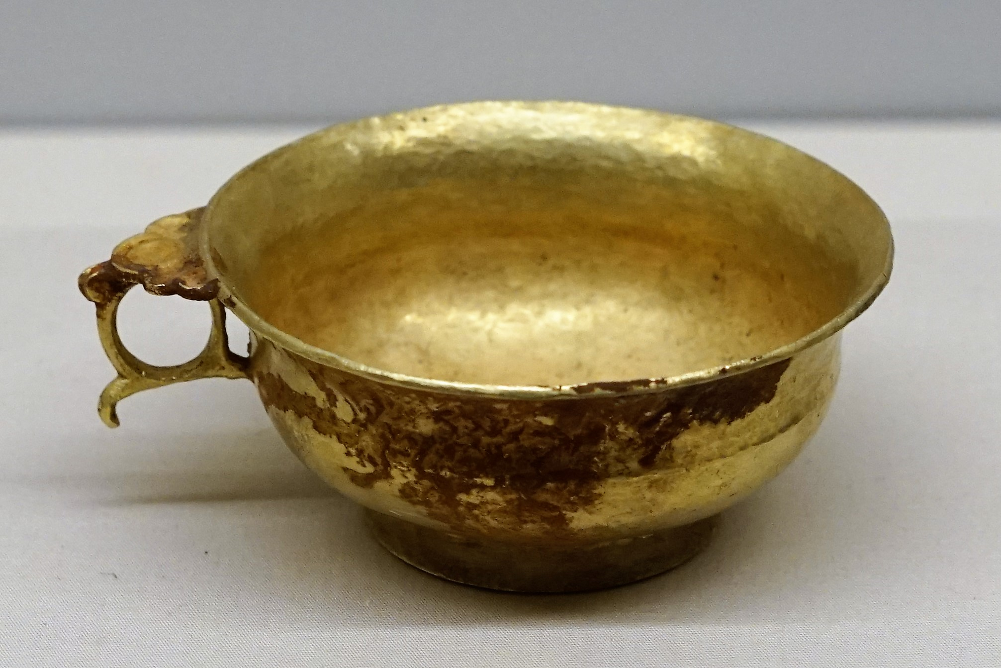 中文（中国大陆）: 唐·吐蕃。一级文物。青海3.15盗掘古墓古文化遗址案追缴。粟特地区风格。平鋬上有简单卷草纹。腹部折棱一周。器身有捶揲痕迹